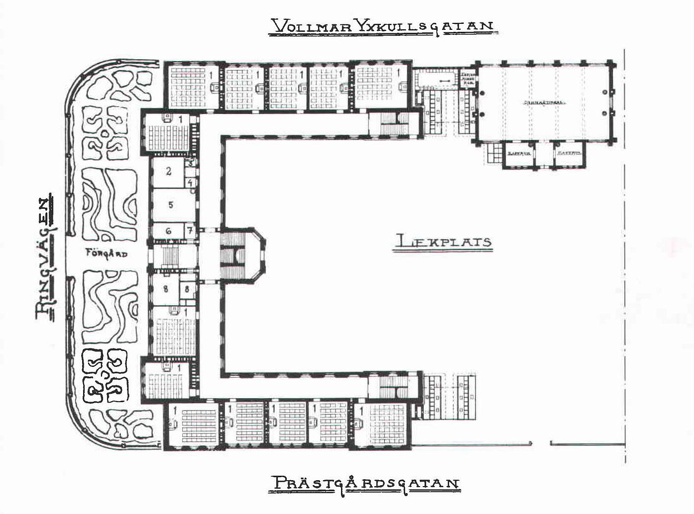 Planritning för Maria folkskola (etapp 1)